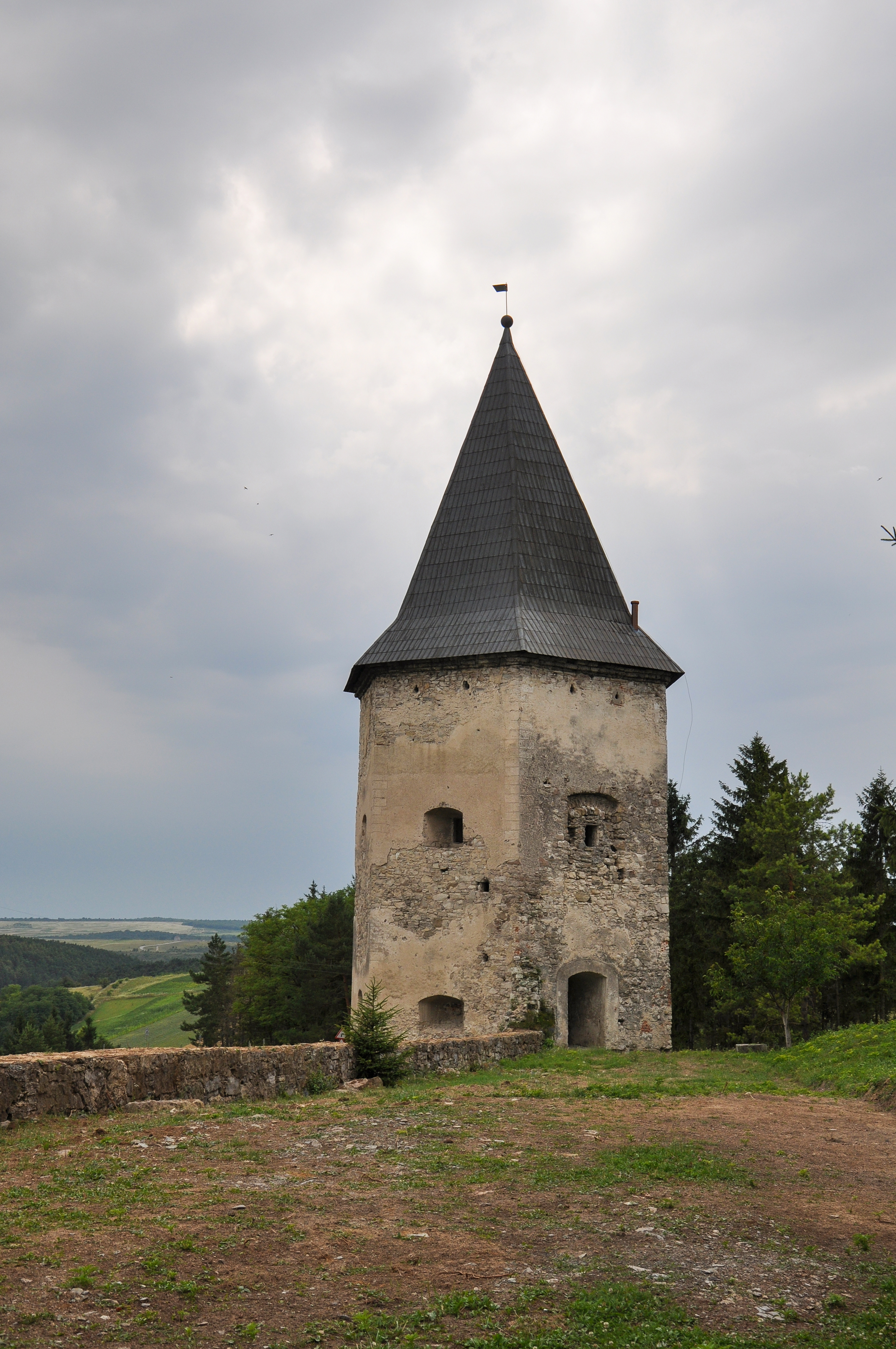 Башта південно-західна, Кривче